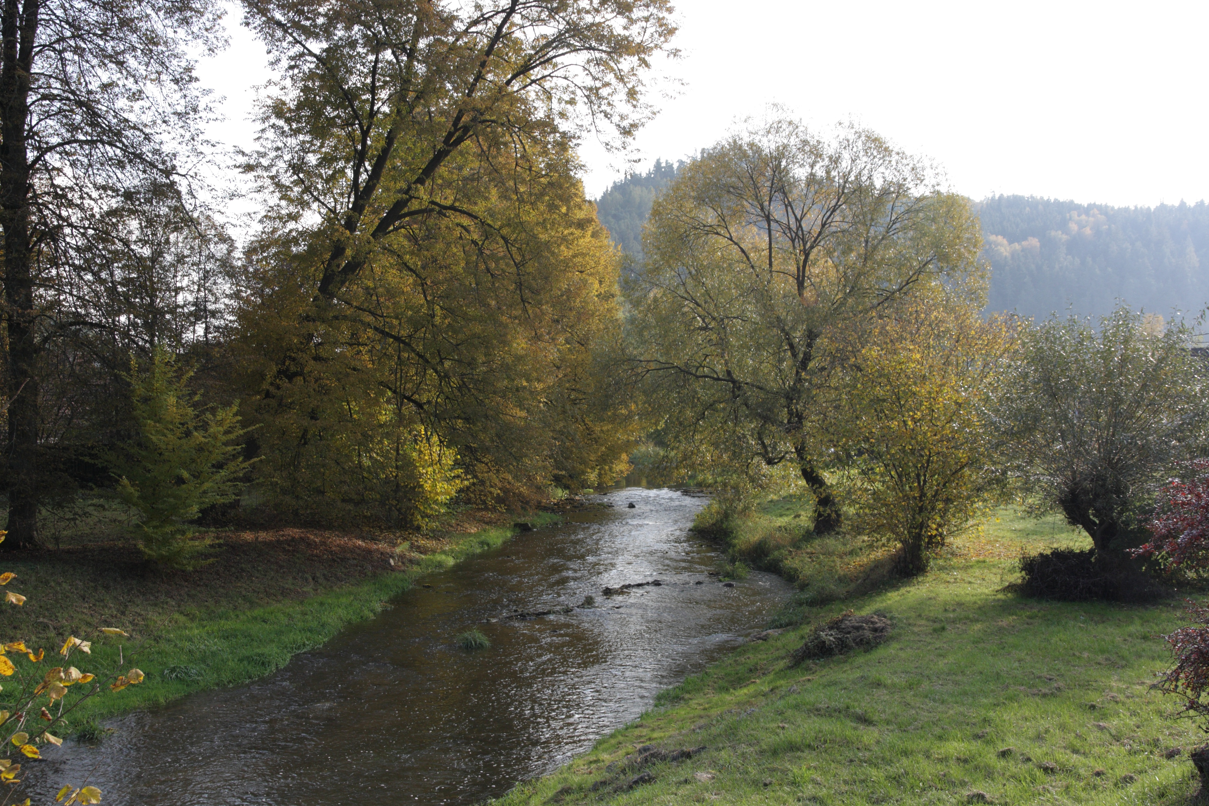 Skryje (okres Brno-venkov) - řeka Bobrůvka